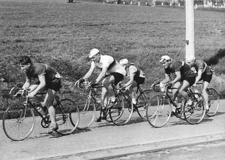 Holstroem, Grupe, Grabowski, Kogeff Zentralbild Kronfeld Bey-Ho 3.5.1955 VIII. Internationale Friedensfahrt Prag-Berlin-Warschau. Auf der ersten Etappe "Rund um Prag". UBz: Die Verfolgergruppe mit (von links) Bernd Holstroem (Schweden), Wolfgang Grupe (DDR), Eligiusz Grabowski (VR Polen) und Bojan Kogeff (VR Bulgarien) auf der Strecke.